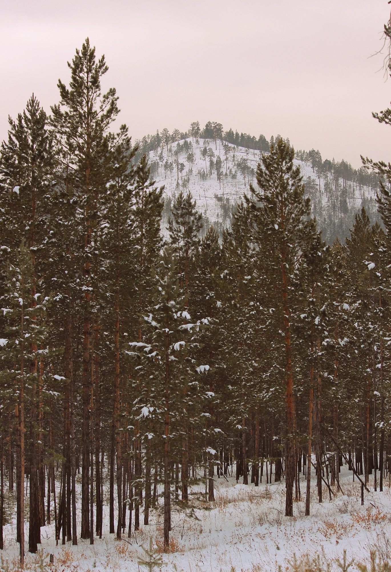 Варварина гора. Старая Брянь, Заиграевский район, Бурятия, Сибирь